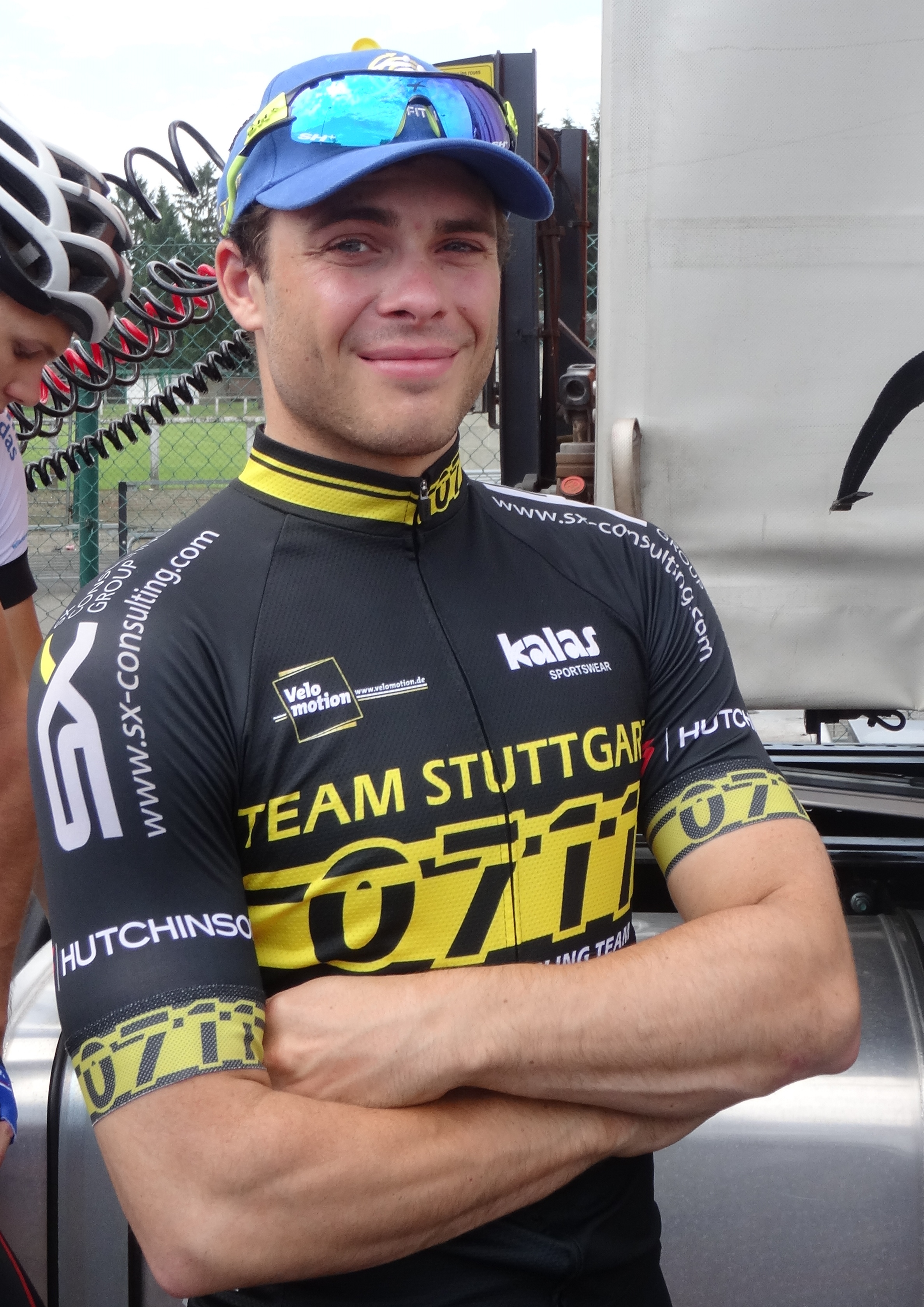 Reportage réalisé le dimanche 8 juin à l'occasion du départ du Mémorial Philippe Van Coningsloo 2014 à Wavre, Belgique.